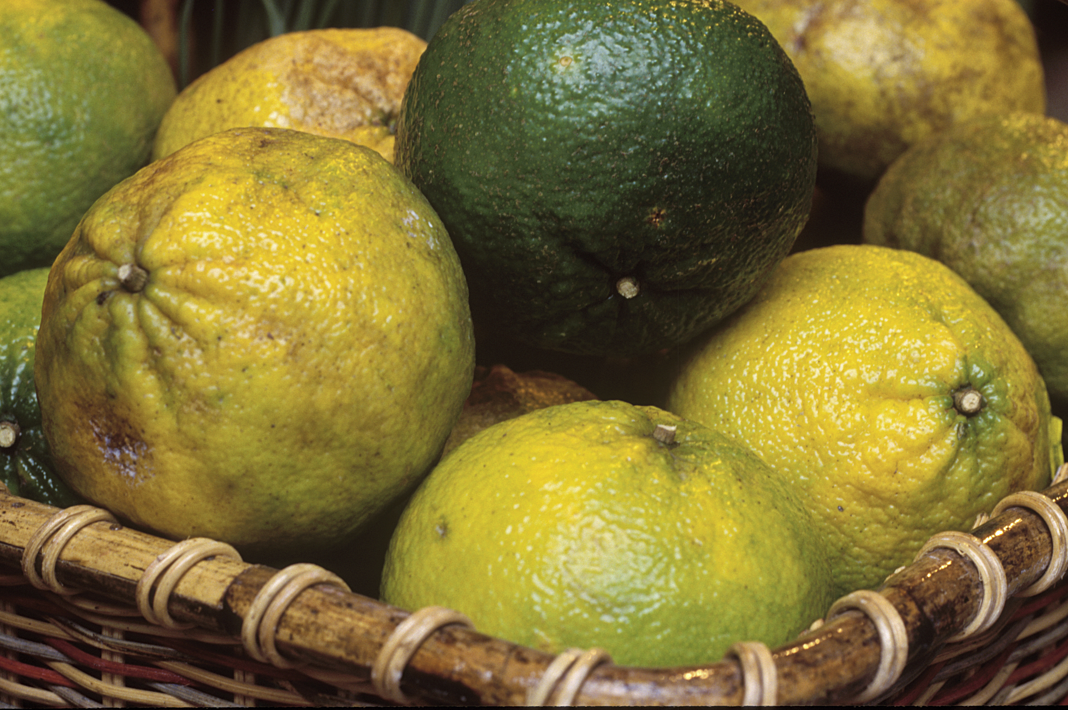 INRA, Jean Weber